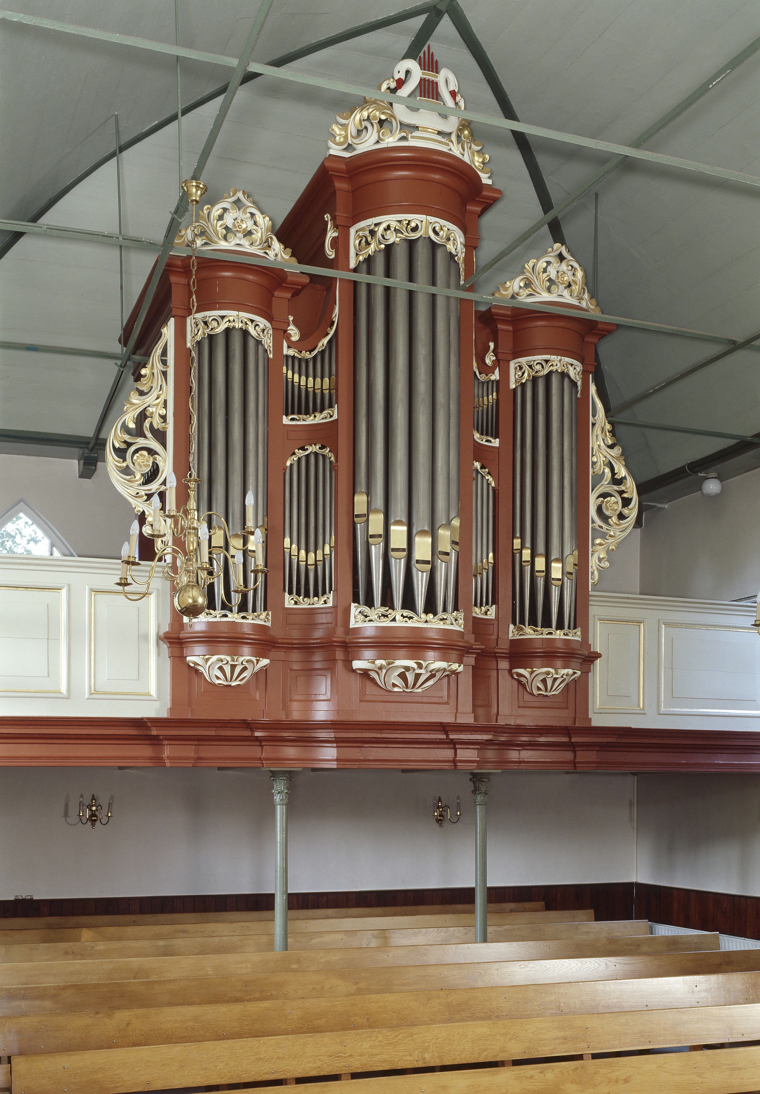 Nederlands Hervormde Kerk: Interieur, aanzicht orgel, orgelnummer 1254 (opmerking: Gefotografeerd voor Het Historische Orgel in Nederland 1878-1886, Bladzijde 362)